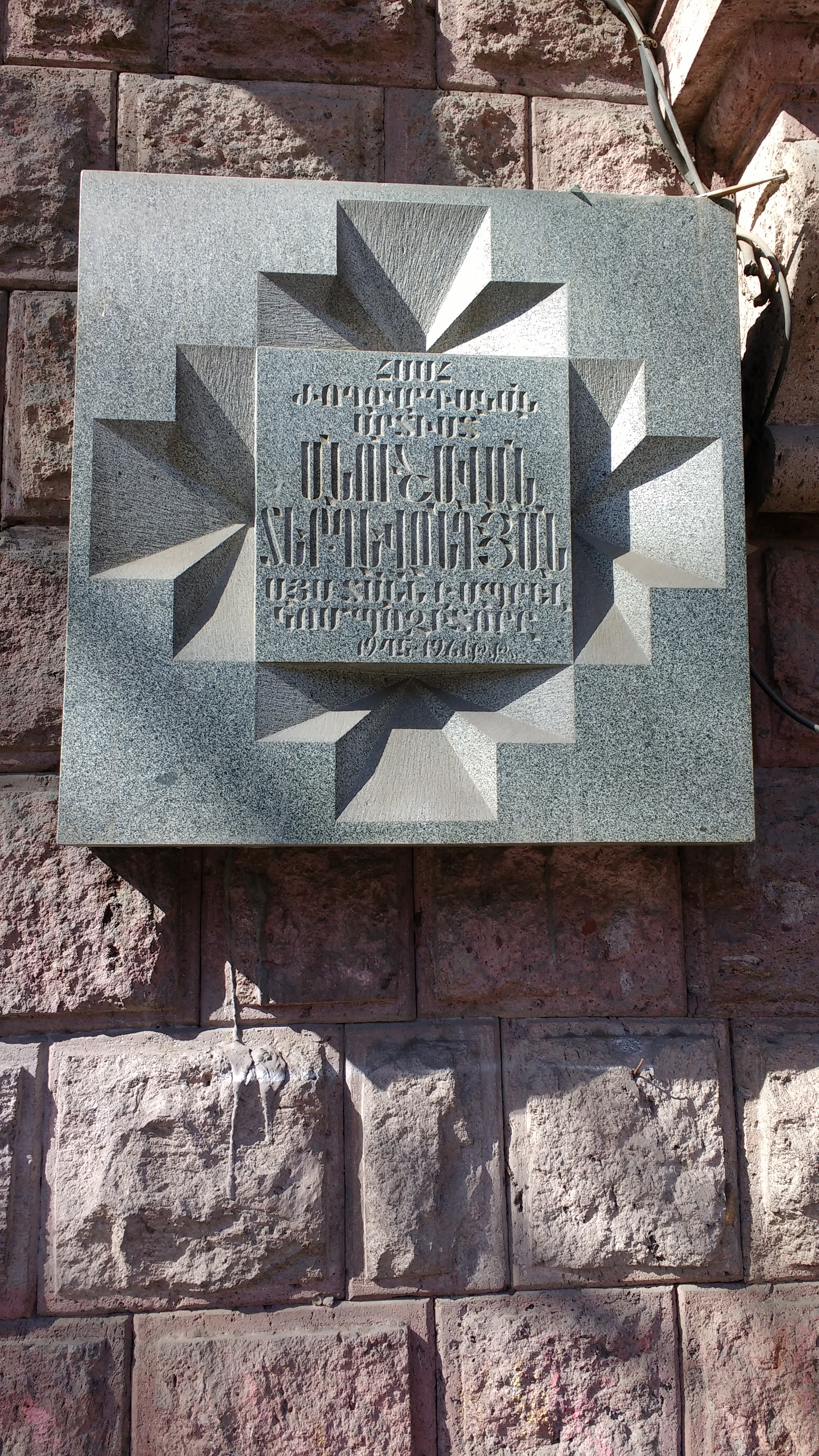 Անուշավան Տեր-Ղևոնդյանի հուշատախտակը Երևանում